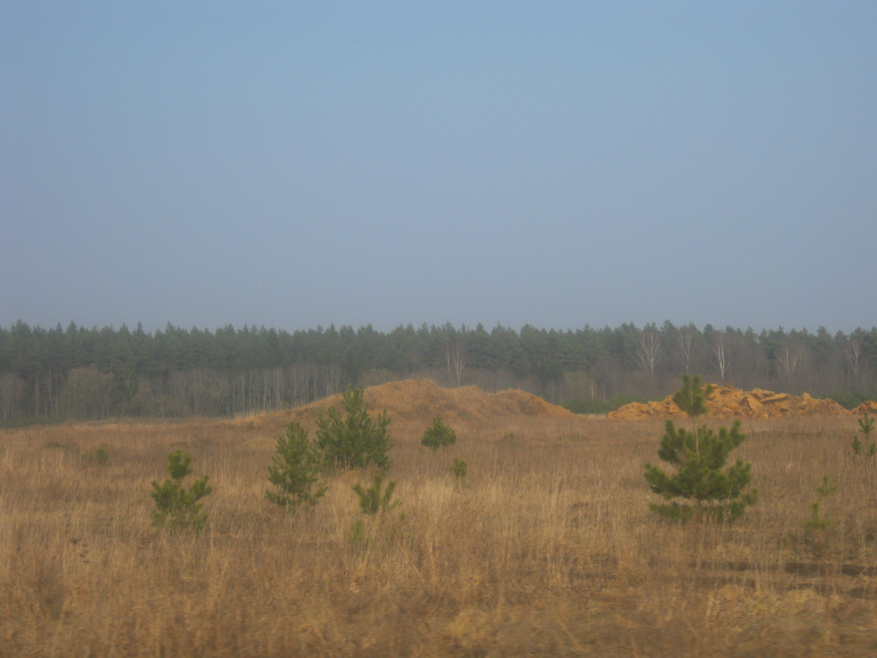 Markutiškių smėlio karjeras